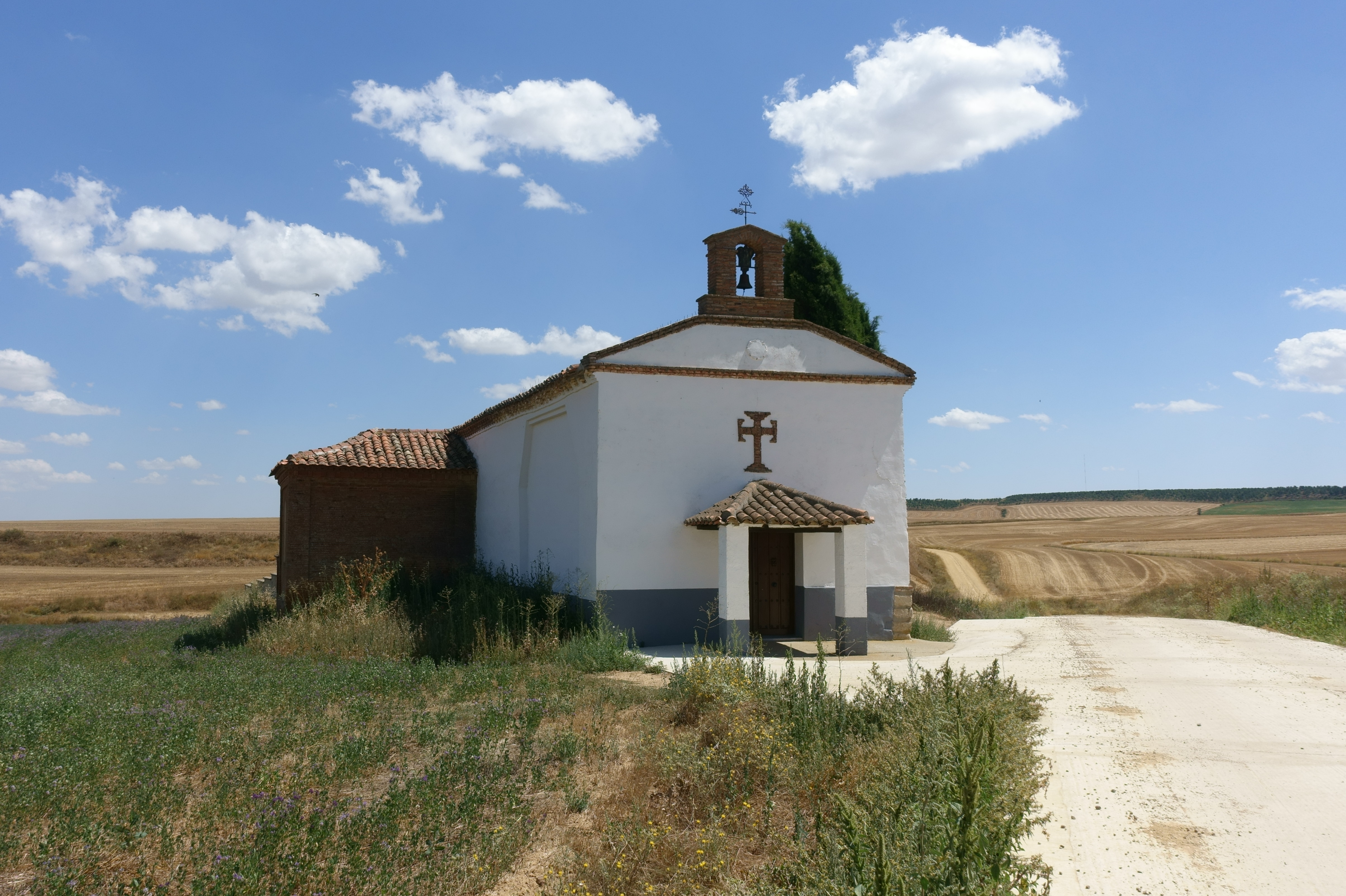 Ermita de Nuestra Señora de Arbas, en Cardeñosa de Volpejera (Palencia, España).